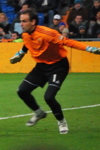 Javier López Vallejo playing for Zaragoza